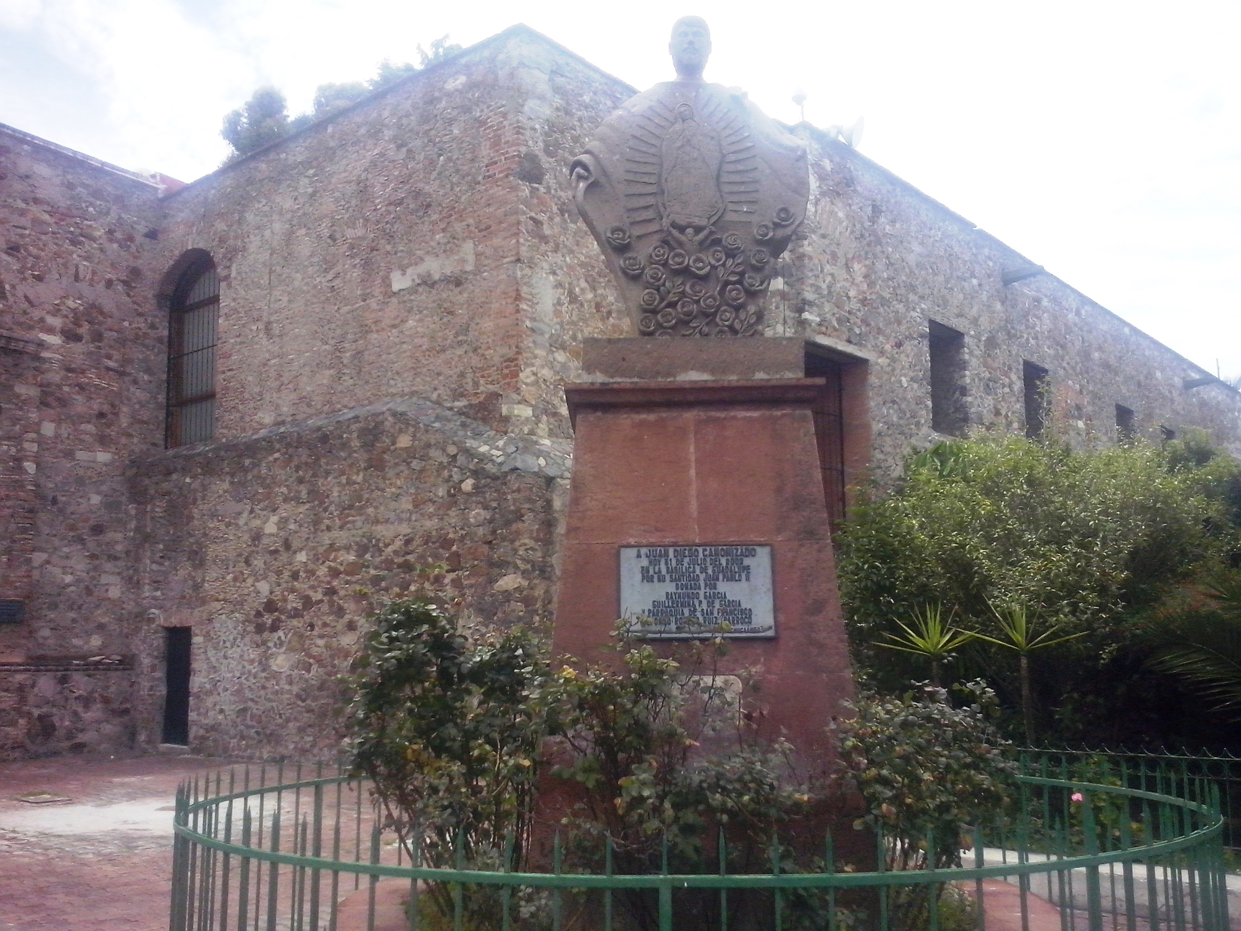 Exconvento de San Francisco en Pachuca, México